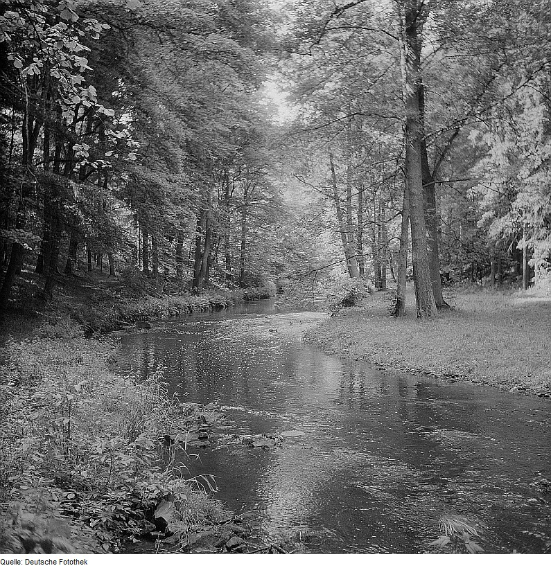 Original image description from the Deutsche Fotothek Seifersdorfer Tal